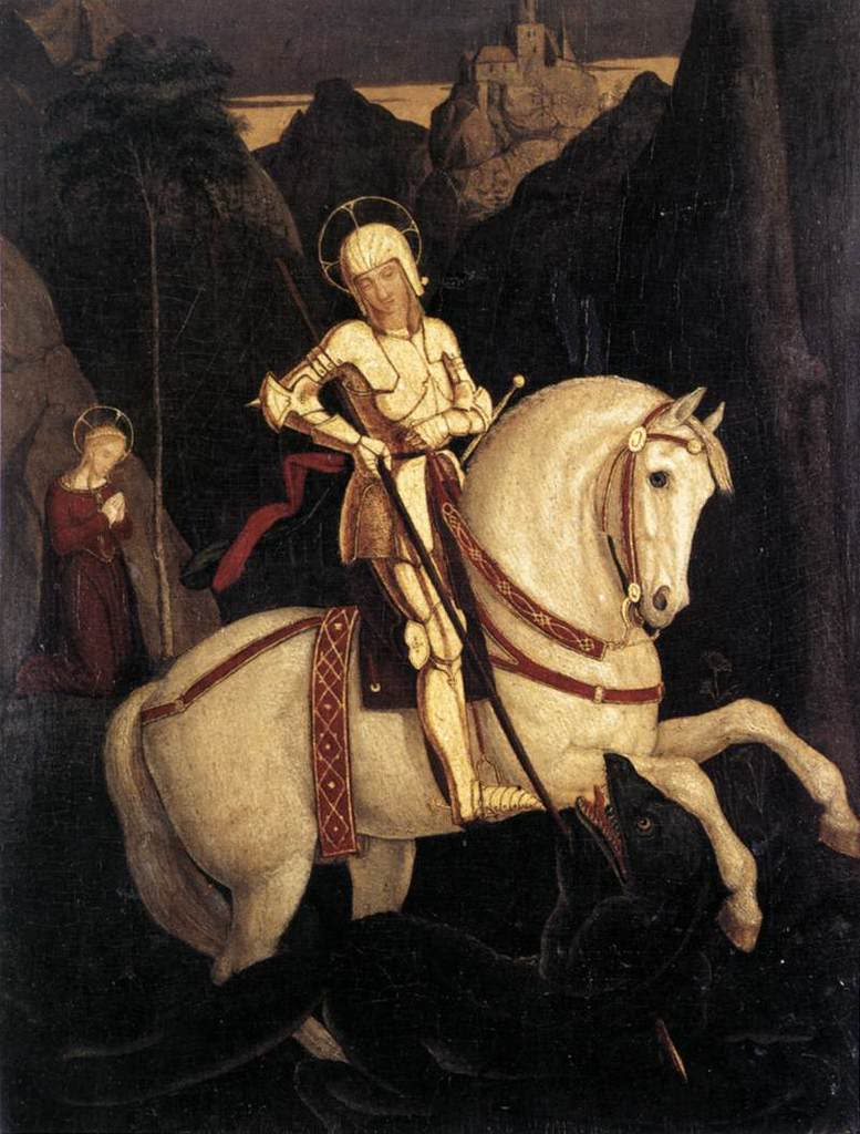 St. George